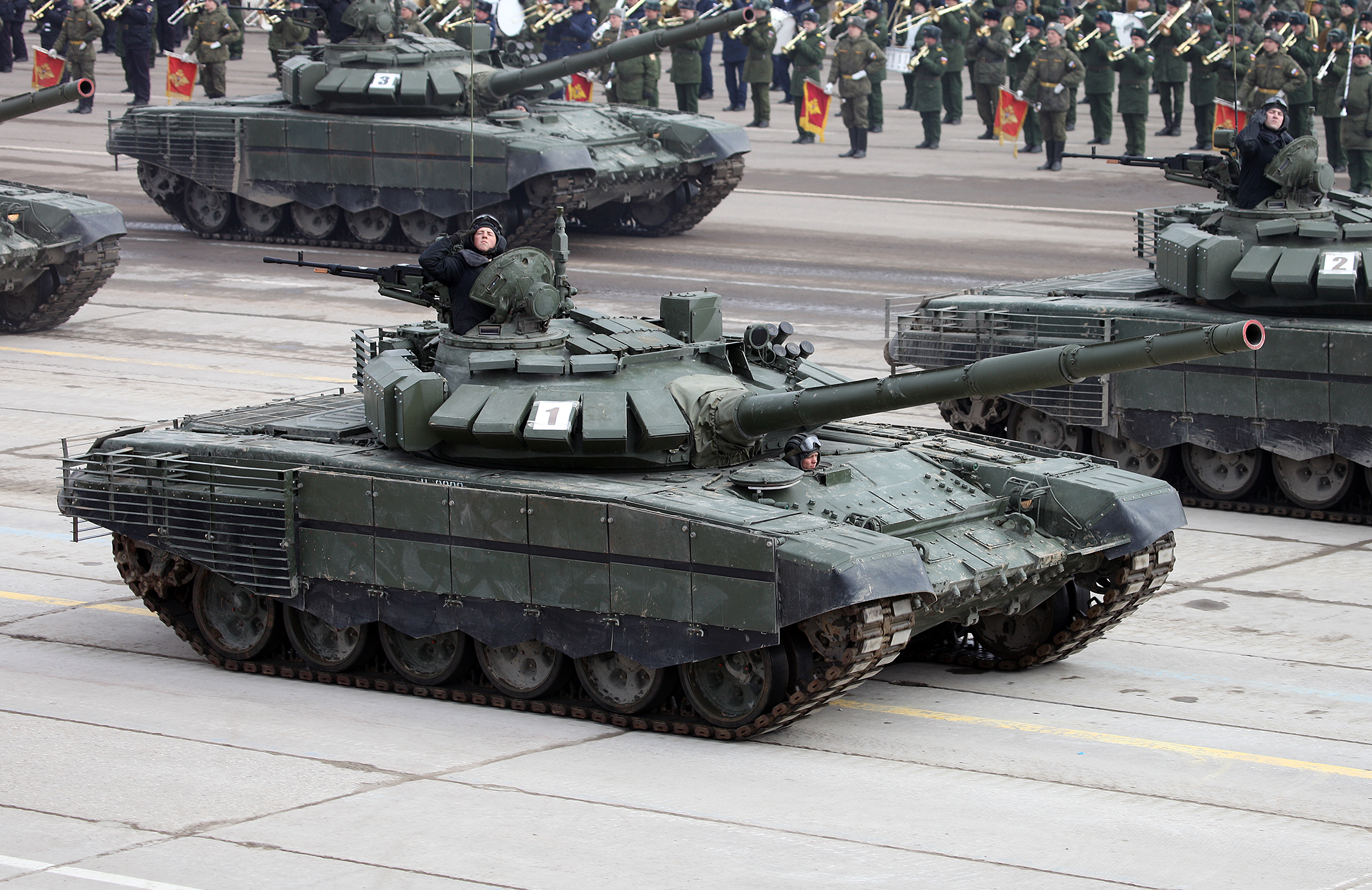 Модернизированный Т-72Б3 образца 2016 года с дополнительной защитой (Modernized T-72B3 with additional armor)